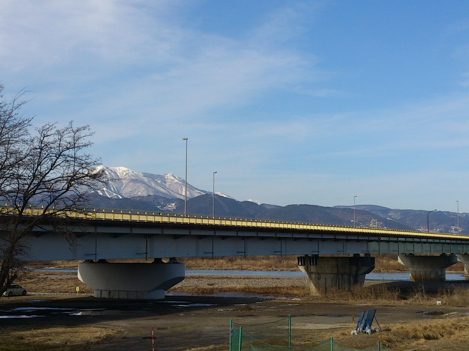 国道18号長野大橋（長野県長野市）